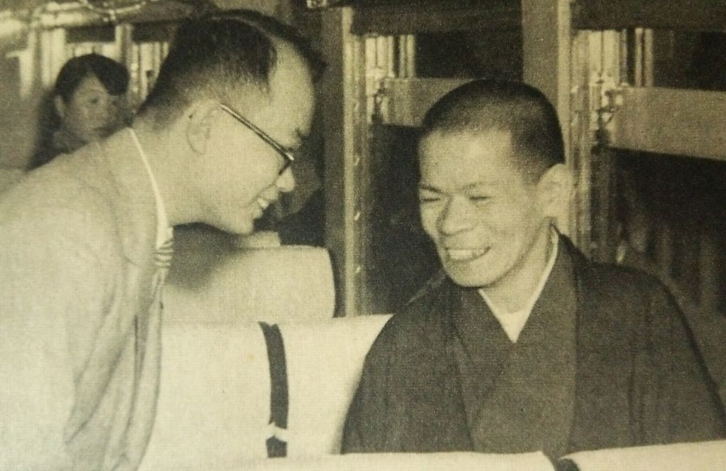 大島康晴（左）と高島一岐代（右）